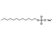 تۆرکجه: سدیم لوریل سولفات - منفی یوکلو سورفکتانت نمونه سی